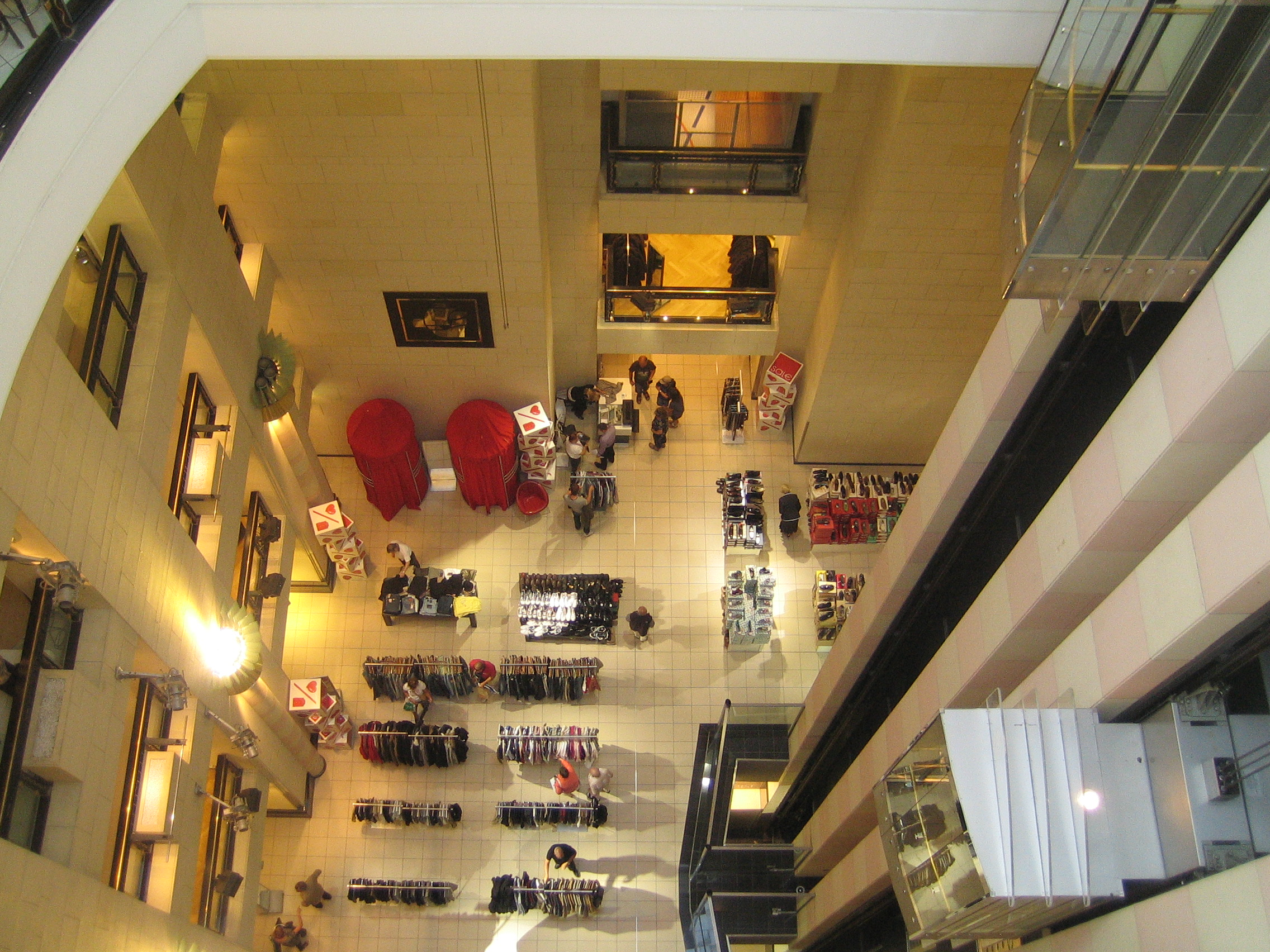 Das "Kaufhaus des Westens" (KaDeWe) in Berlin-Schöneberg, Licht- und Fahrstuhlschacht. Oben ein Imbissraum der Feinschmeckeretage.